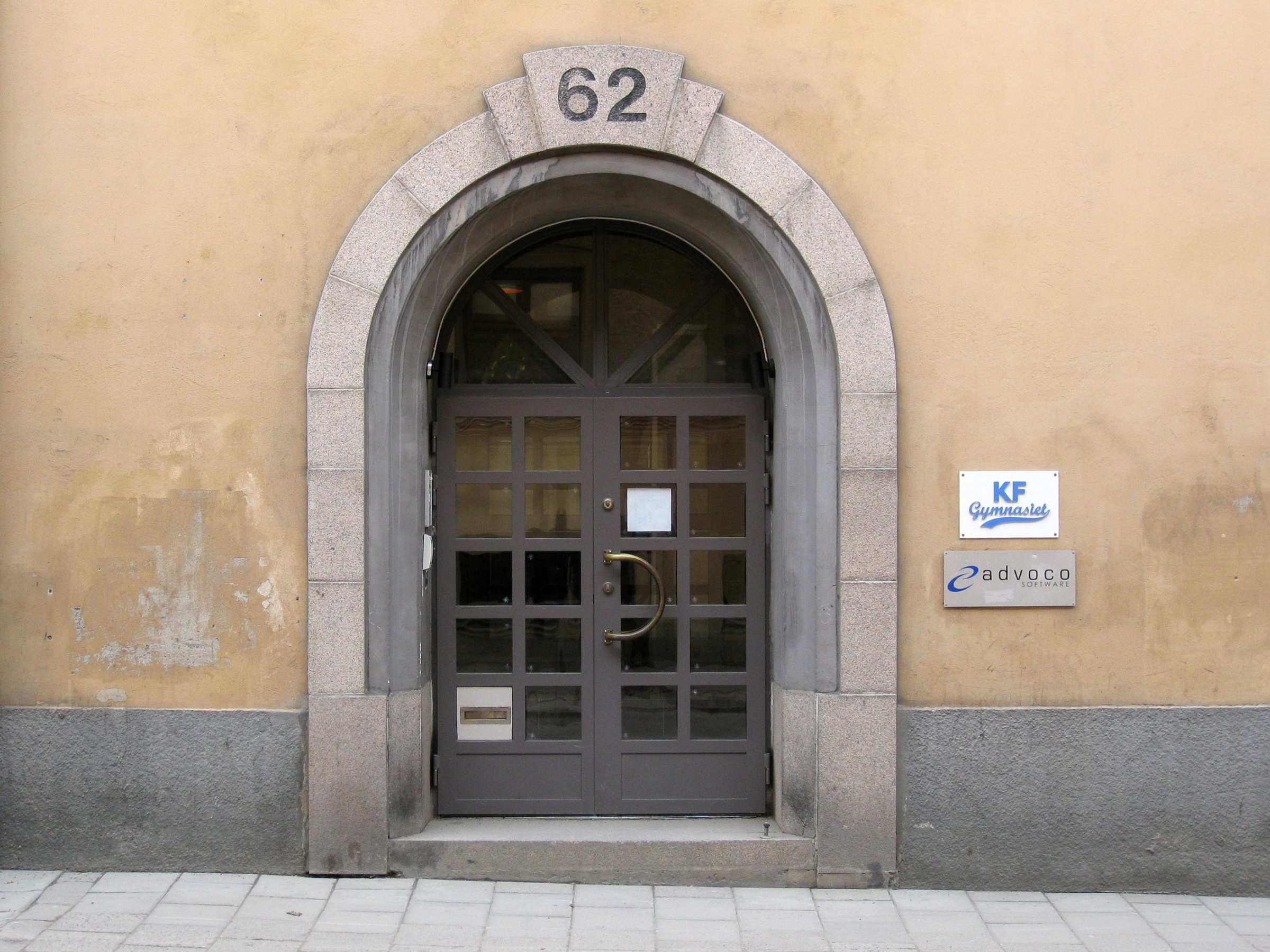 KF gymnasiet, Södermalm, Stockholm.